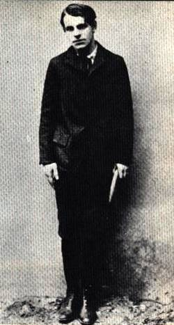 Alexander Moissi als Moritz Stiefel in der Uraufführung von Wedekinds "Frühlings Erwachen" (1906)